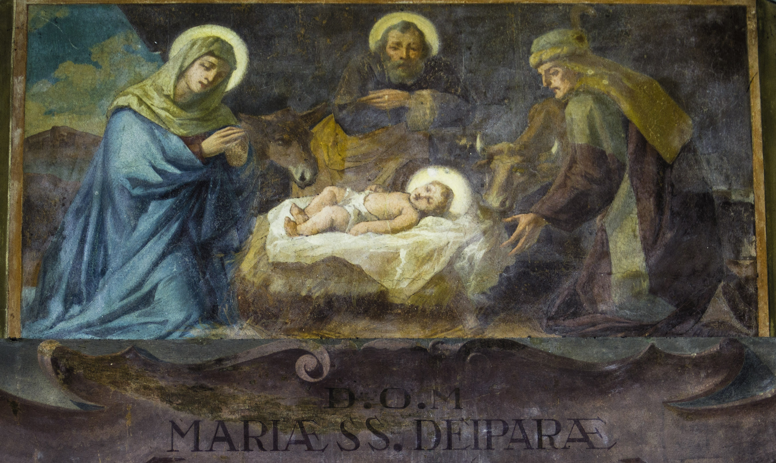 Chiesa di Madonna in Veroncora, Busto Arsizio This is a photo of a monument which is part of cultural heritage of Italy.